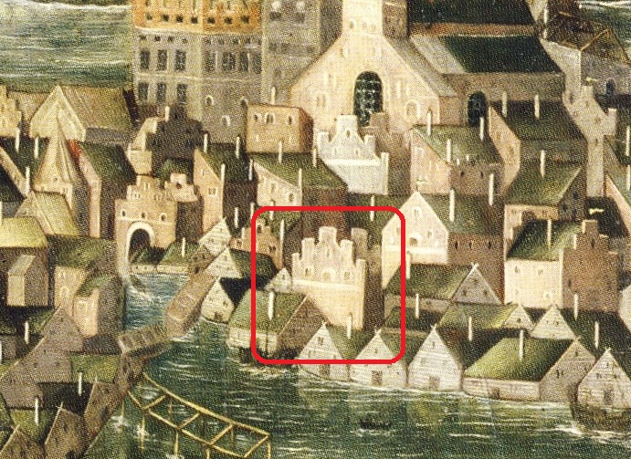 Del av "Vädersolstavlan", ursprungligen målad av Urban målare 1535, hänger i Storkyrkan i Stockholm. Utsnittet visar bl.a. Gråmunketornet och Lejontornet (i röd ram)